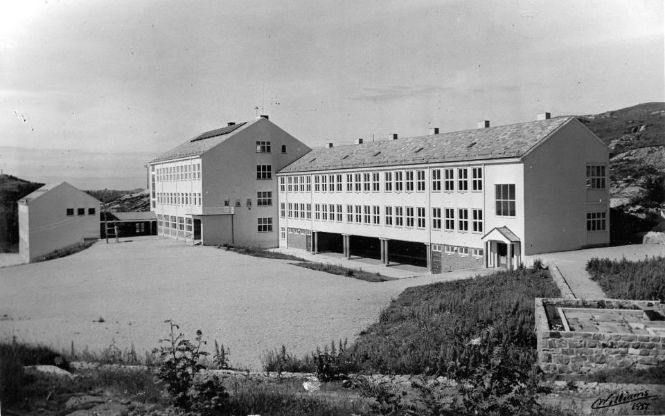 Øivind Kruse, arkivar i seksjon for elektronisk arkivdanning, har funnet frem sitt favorittbilde. "For meg ble det naturlig å søke hjemover da jeg ble utfordret til å finne mitt favorittbilde. I serien" Brente steders regulering" står det en boks merket "Kristiansund 1940-1959". Der er det flere bilder som dokumenterer ødeleggelsene fra krigen, samt oppbyggingen etter krigen. Der fant jeg dette bildet av Nordlandet skole fra 1951, og den ser akkurat ut slik den gjorde da jeg tråkket mine barnsben der på 1980-tallet. I skurene under hovedbygget til høyre i bildet brukte vi friminuttene på "trenga", og i bygget til venstre var det gymsal øverst og sløyden i underetasjen. Skolen ble tatt i bruk i 1949, så på dette bildet er den flunkende ny. Etterkrigshistorie, gjenoppbyggingen av hjembyen min, blandet med nostalgi fra barndommen gjorde at dette ble mitt favorittbilde." Arkivreferanse: Riksarkivet, Arkiv S-1540 Brente steders regulering Ua7a_2_3. Nordlandet skole, Kristiansund . Arkitekt O. Hedlund. Fotograf Williams.